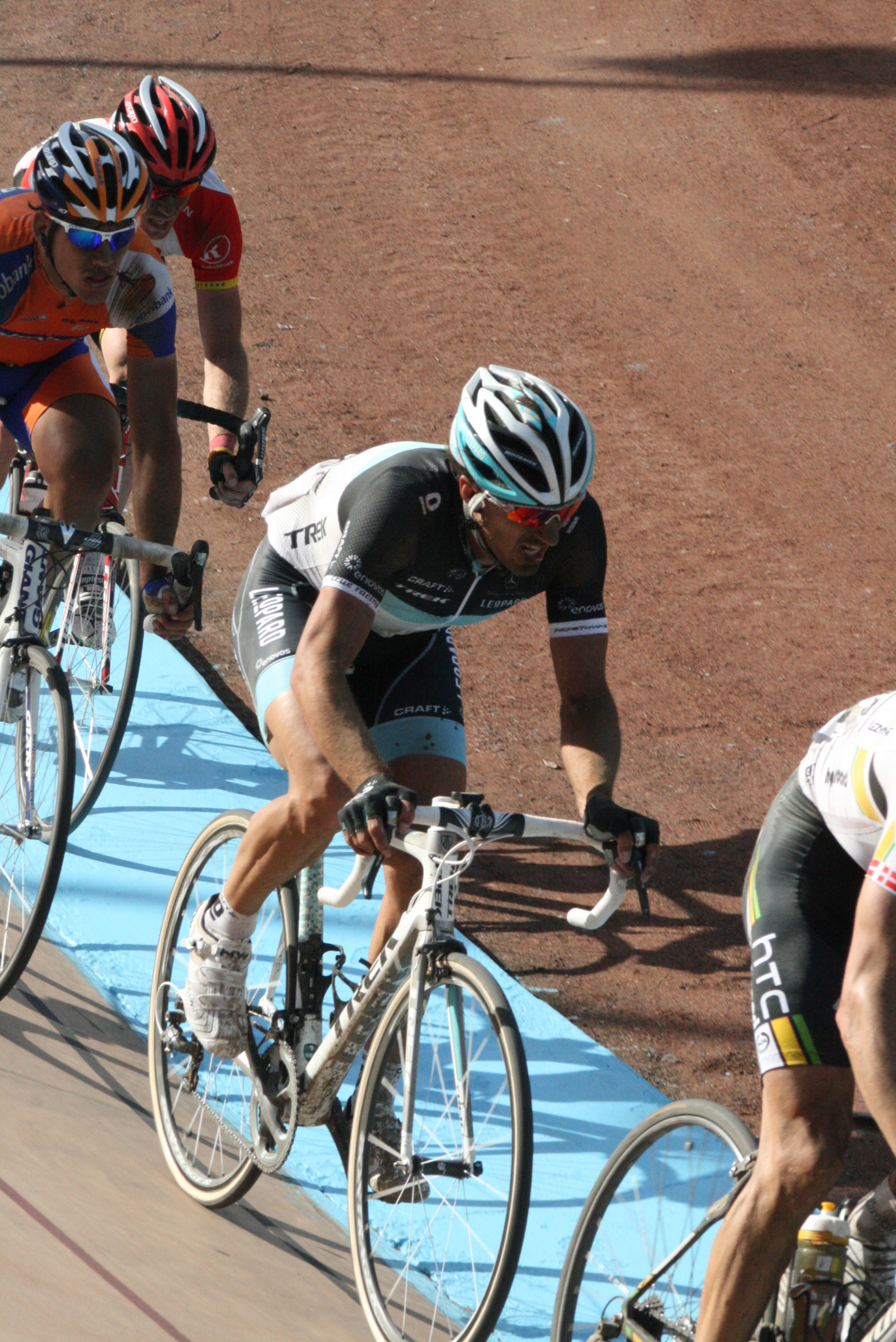 Arrivée de Paris-Roubaix 2011 au vélodrome de Roubaix Fabian Cancellara, Maarten Tjallingii